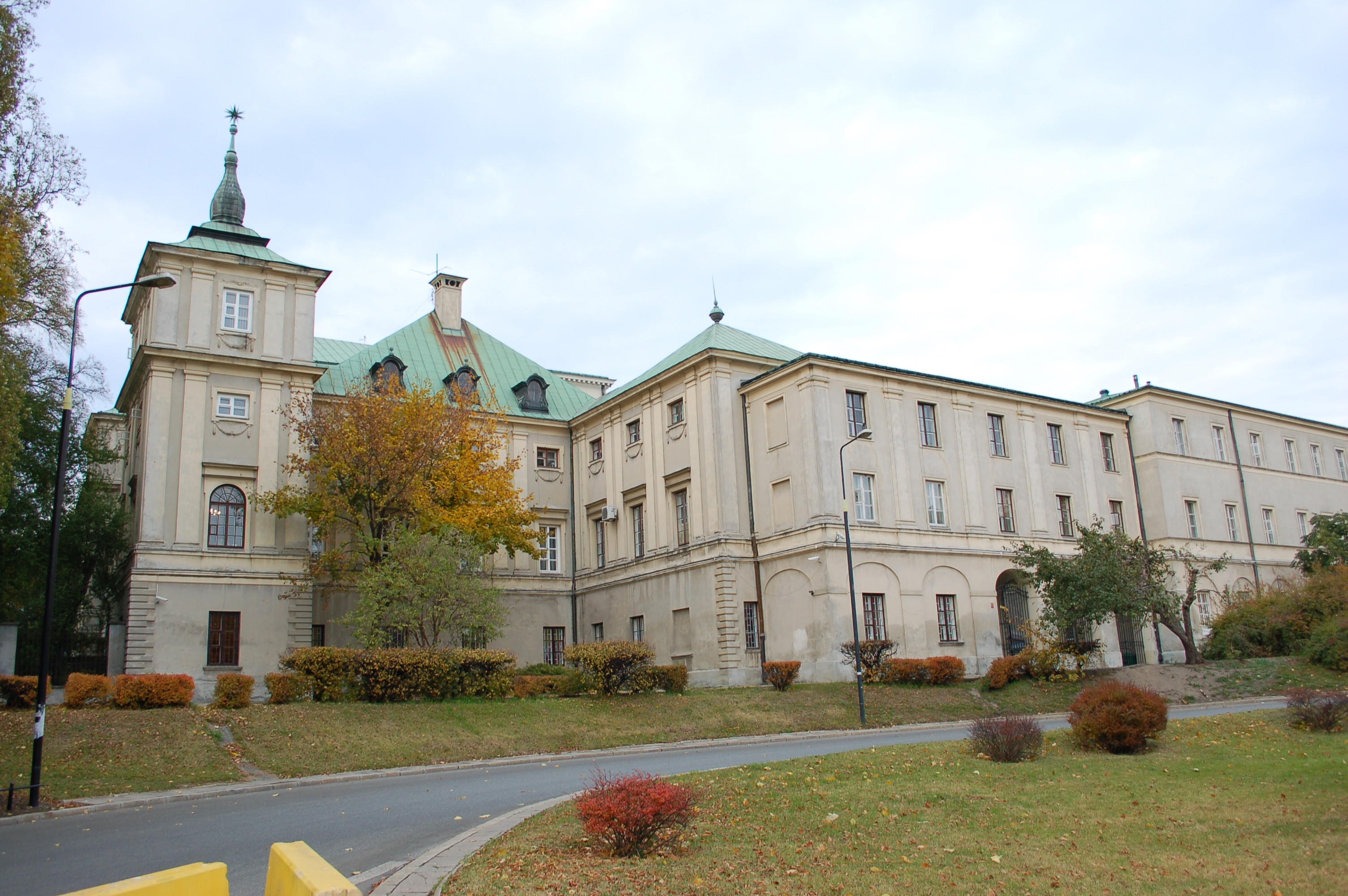 Miodowa Street in Warsaw